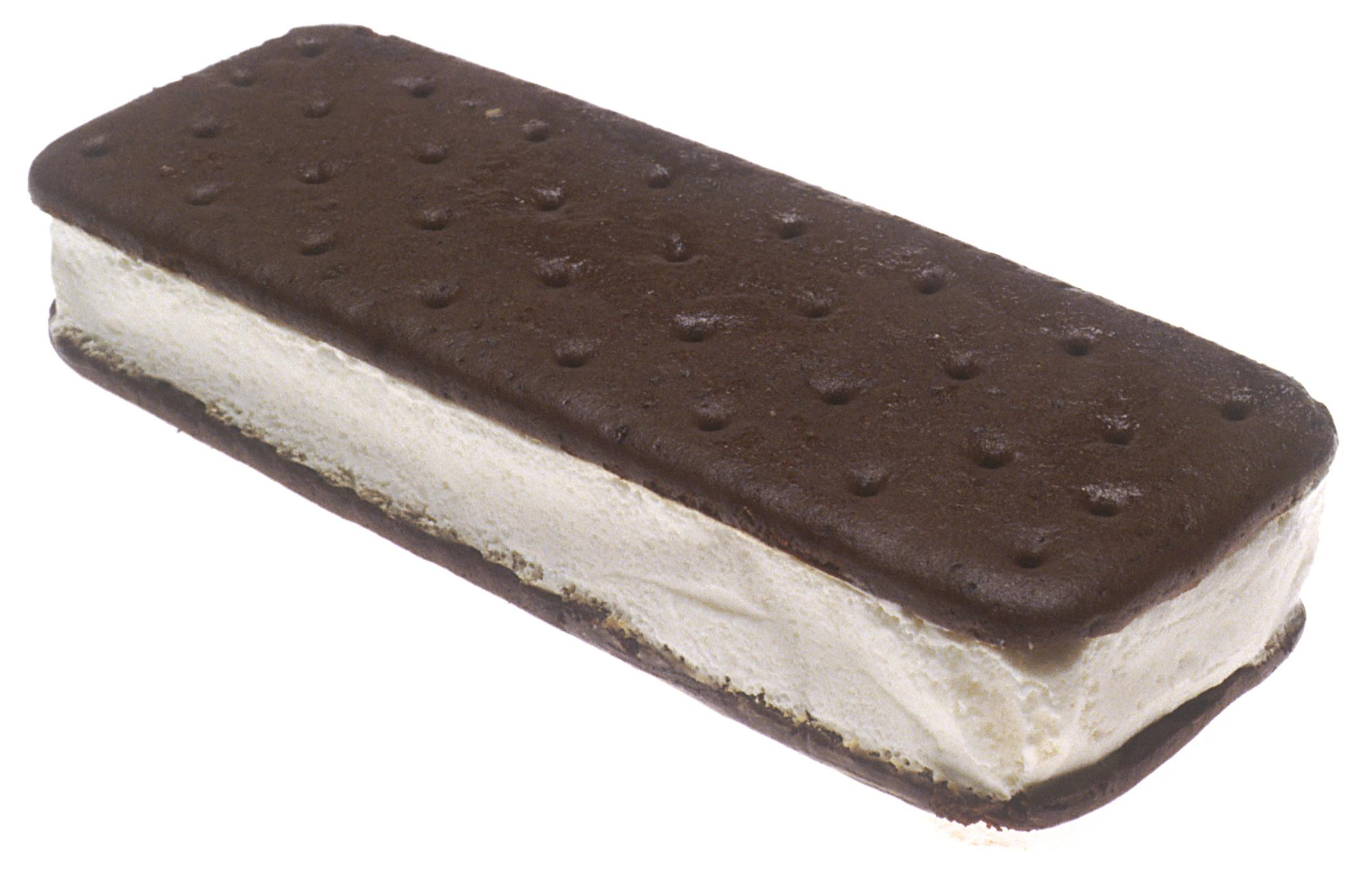 a single vanilla ice cream sandwich